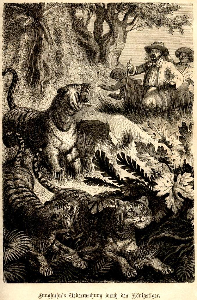 Junghuhn's Überraschung durch den Königstiger